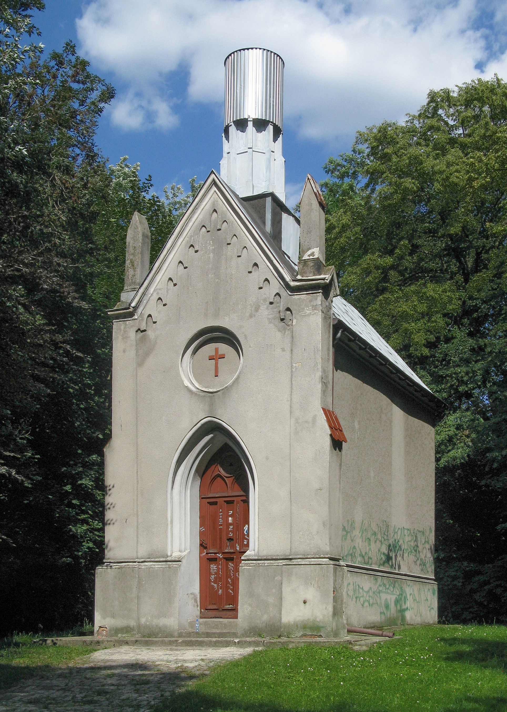 Kaplica na górze Gryca, Bytom-Miechowice.